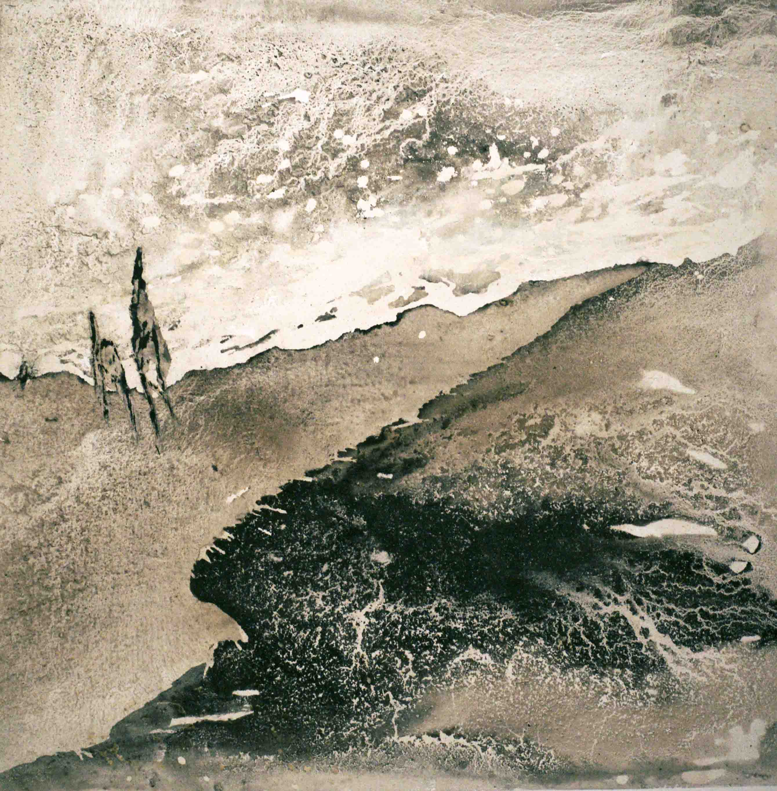 Encre sur toile 150/150cm - 2014